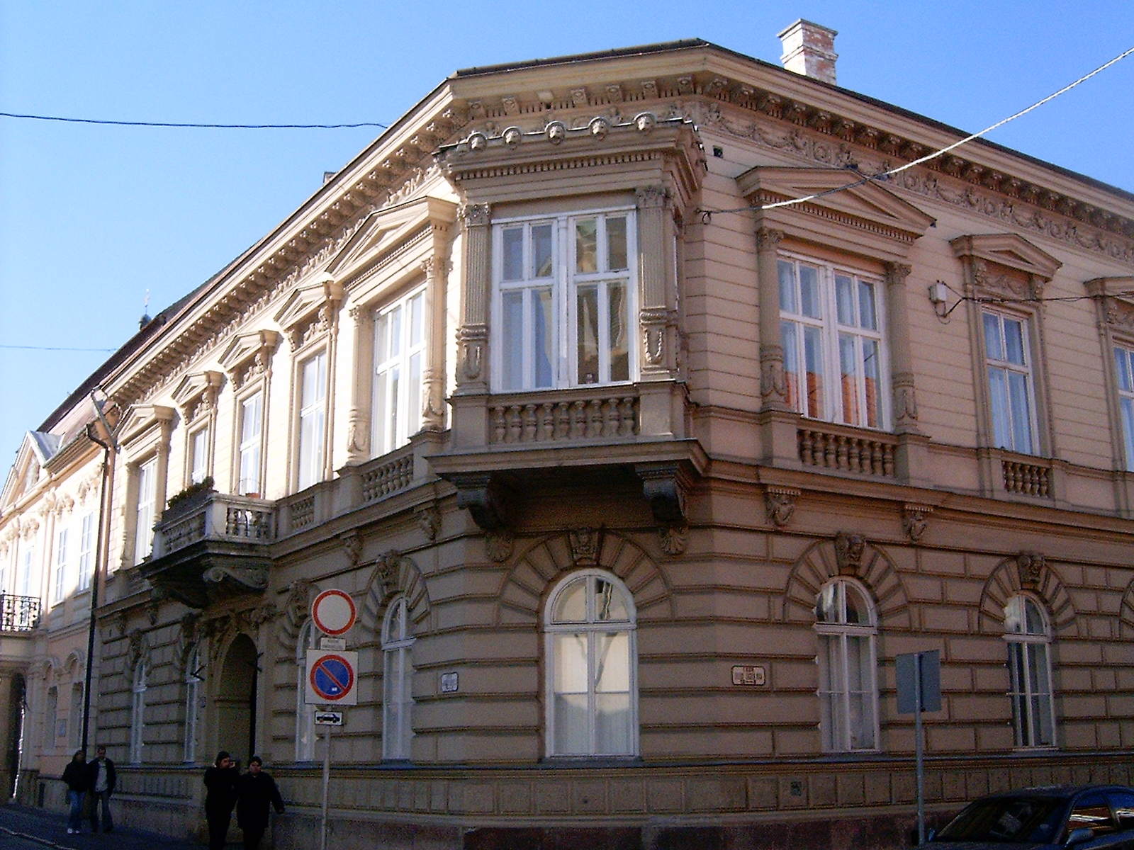 A győri Rákóczi utca 3. szám alatti lakóház sarokerkélye (Győr-Moson-Sopron megye)